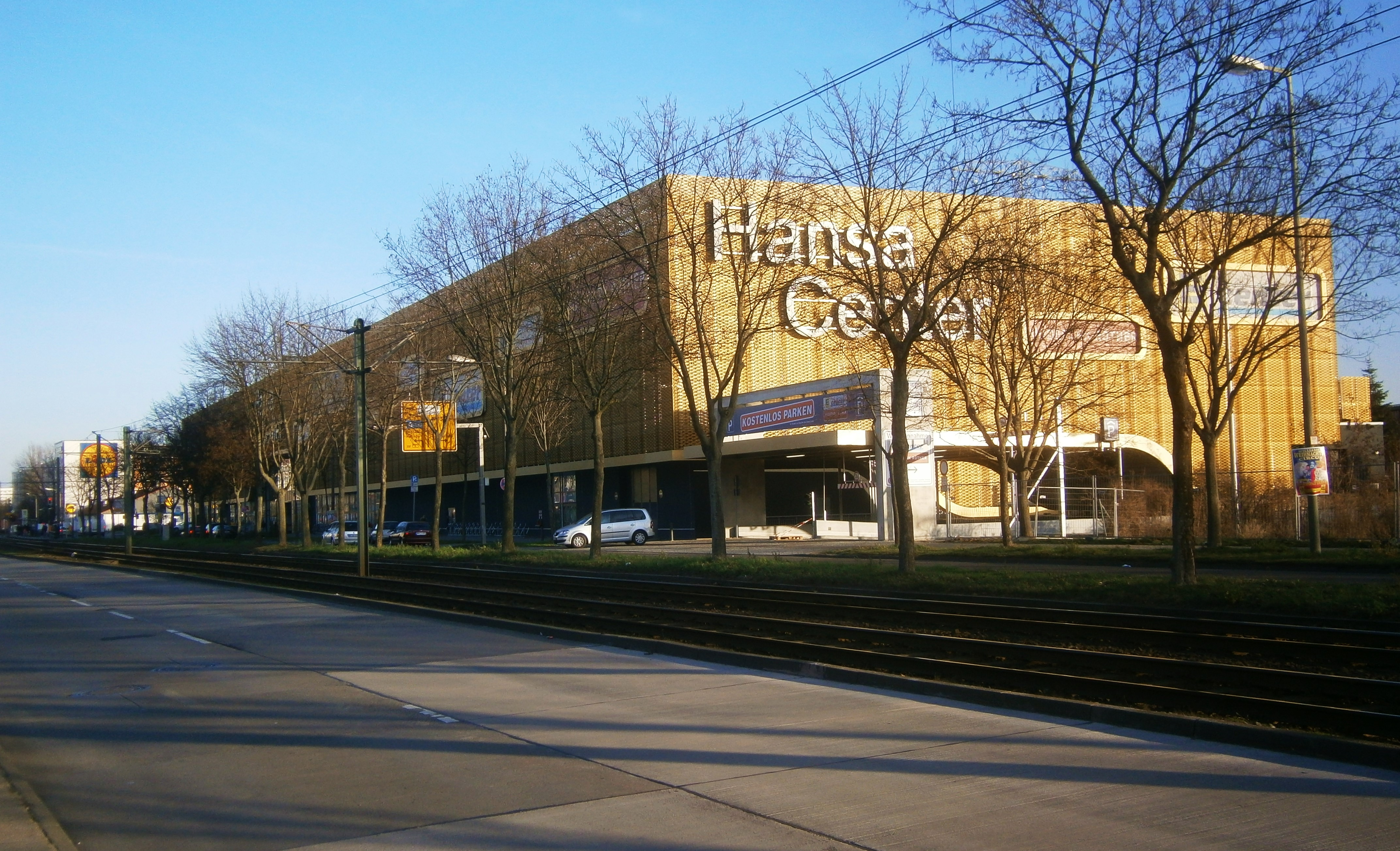 Die Hansastraße ist eine Straße mit übergeordneter Bedeutung in den Berliner Bezirken Pankow und Lichtenberg, zu den Ortsteilen Alt-Hohenschönhausen und Weißensee. Sie liegt zwischen der Indira-Gandhi-Straße und der Großsiedlung Hohenschönhausen-Nord. Die Nordostecke der Hansastraße wird auf einer Länge von 200 Metern von einem Einkaufskoloss, genannt Hansa-Center, eingenommen - Hansastraße 236.